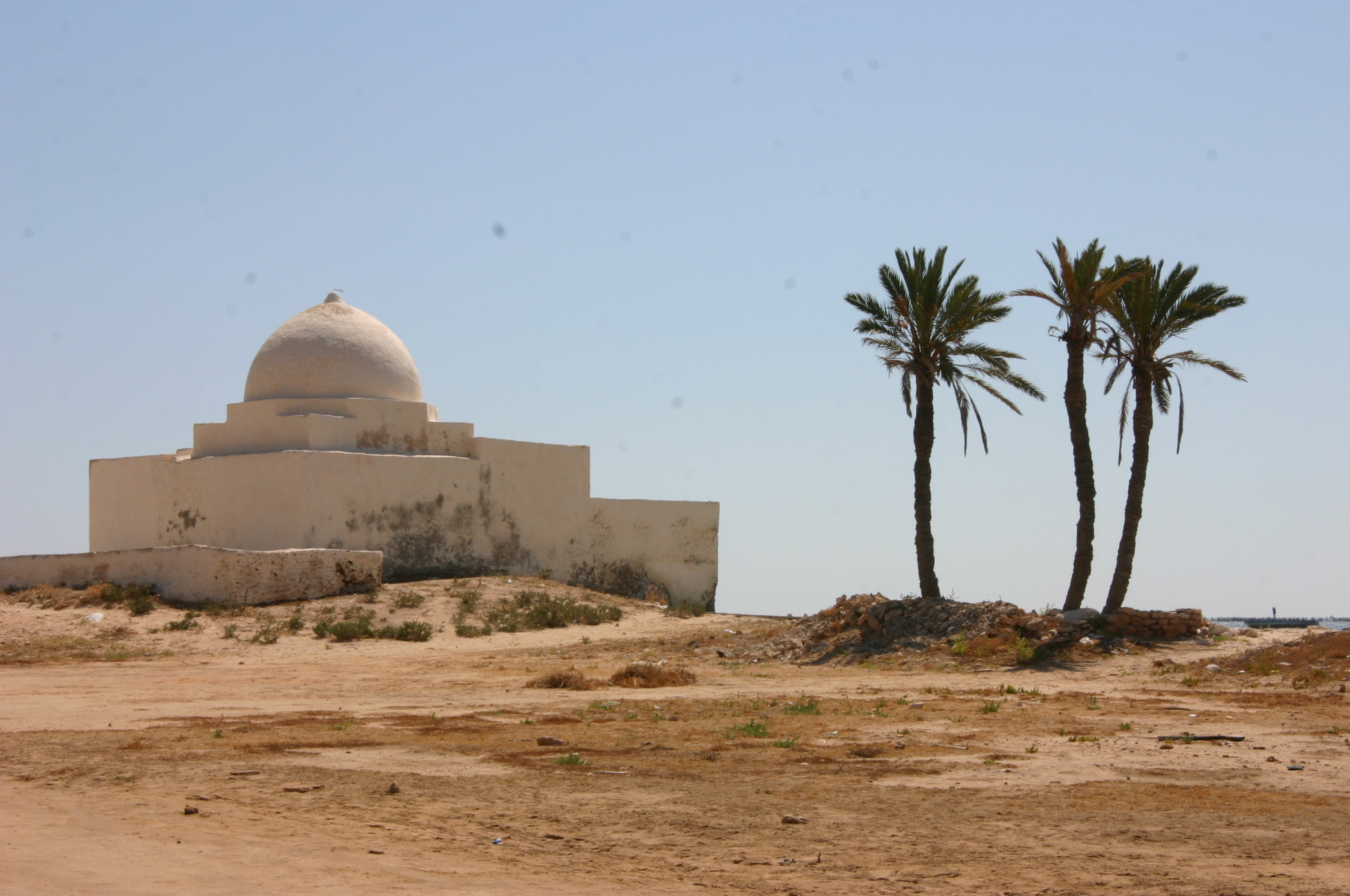 Un marabout (tombeau de saint, Sidi Said) à Ouled Bou Ali Kerkennah.